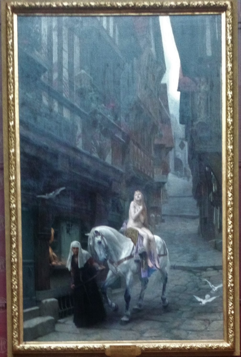 Musée de Picardie, Lady Godiva par Jules Lefebvre (1890) 1